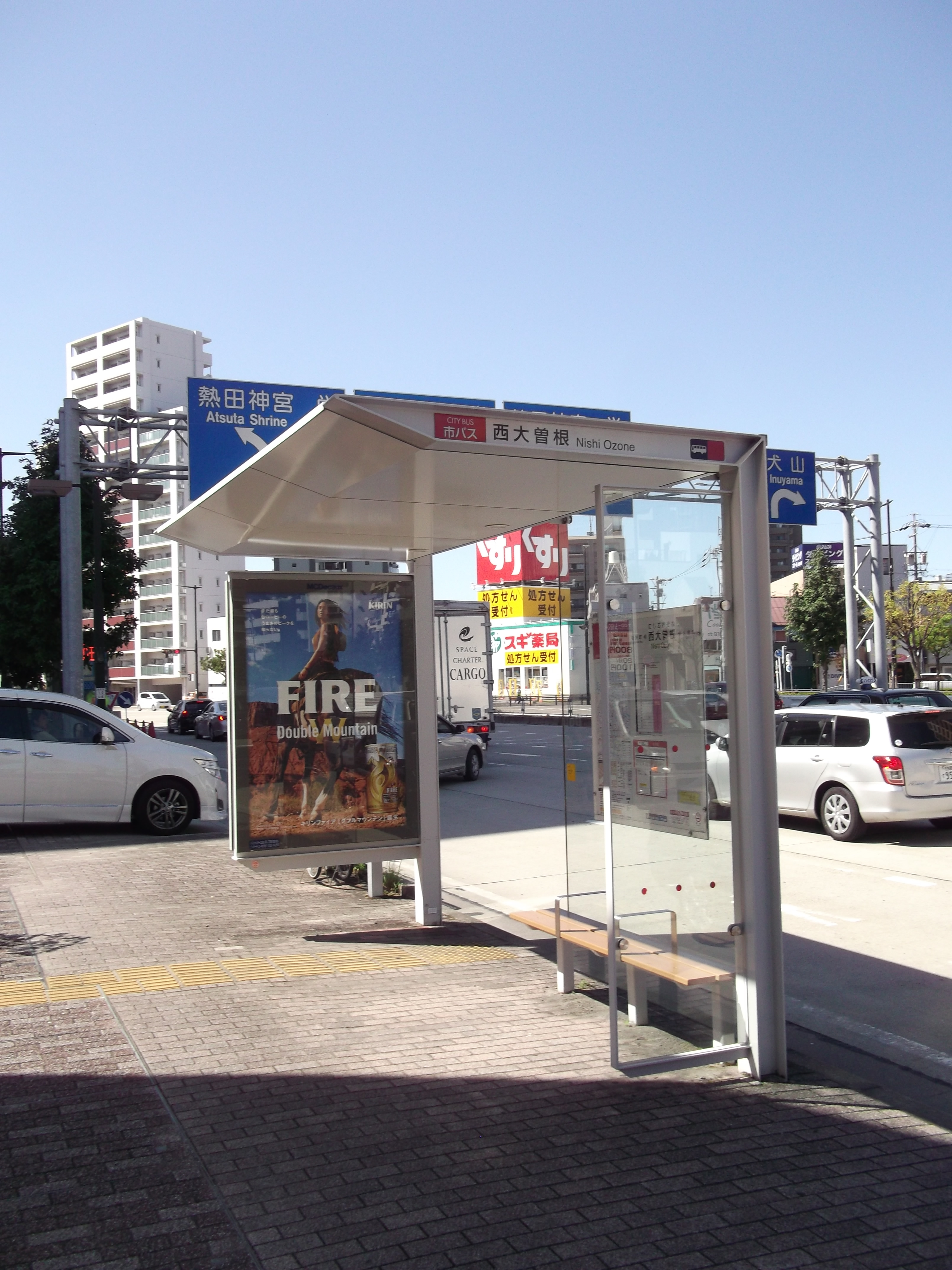 名古屋市北区の名古屋市営バス「西大曽根」停留所を東側から撮影